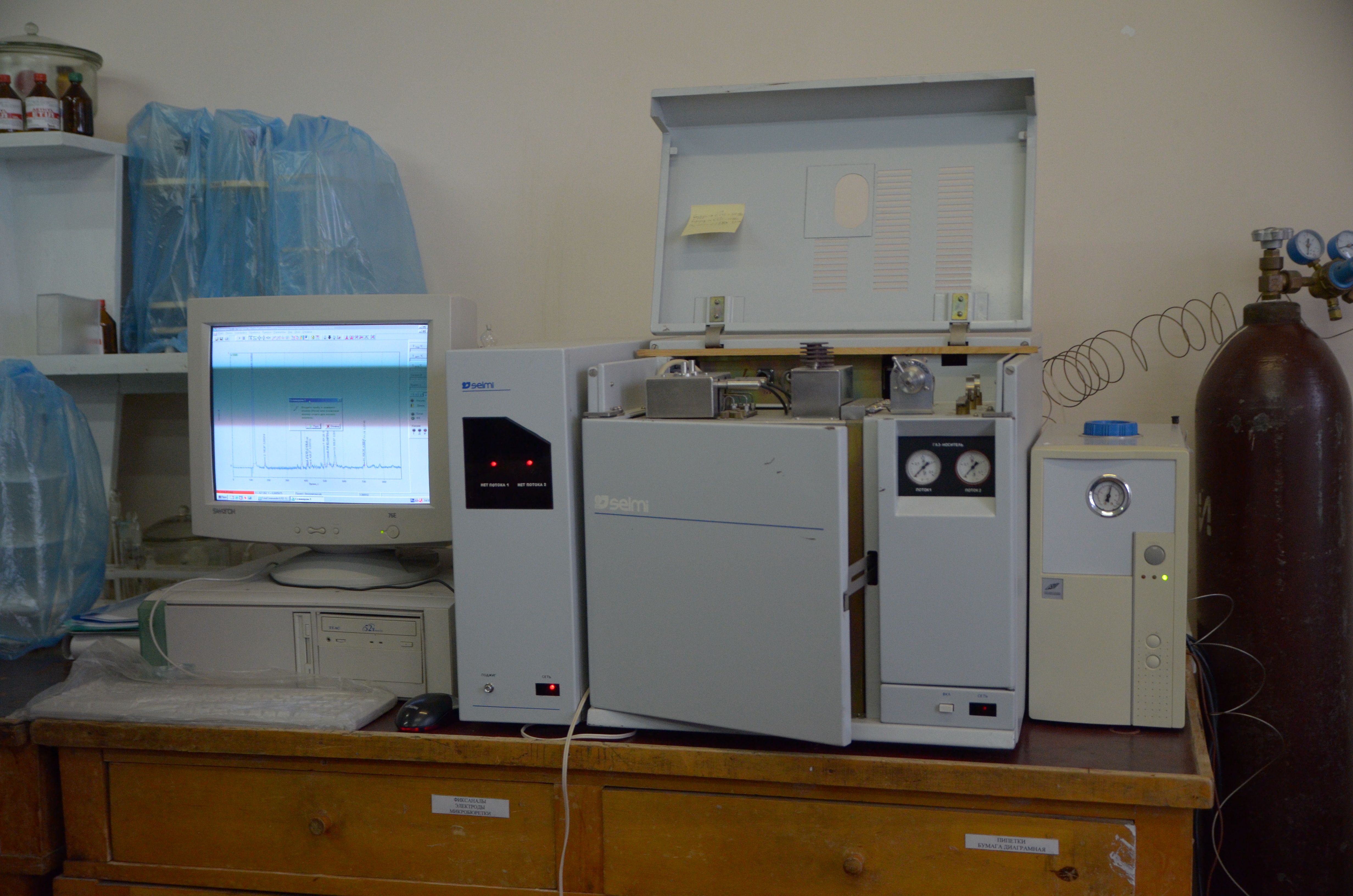 Химический факультет Донецкого национального унивеситета